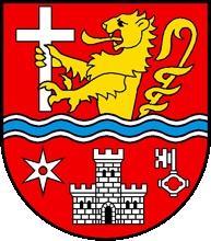 Wappen von Siviriez (Neu) Kanton Freiburg Schweiz